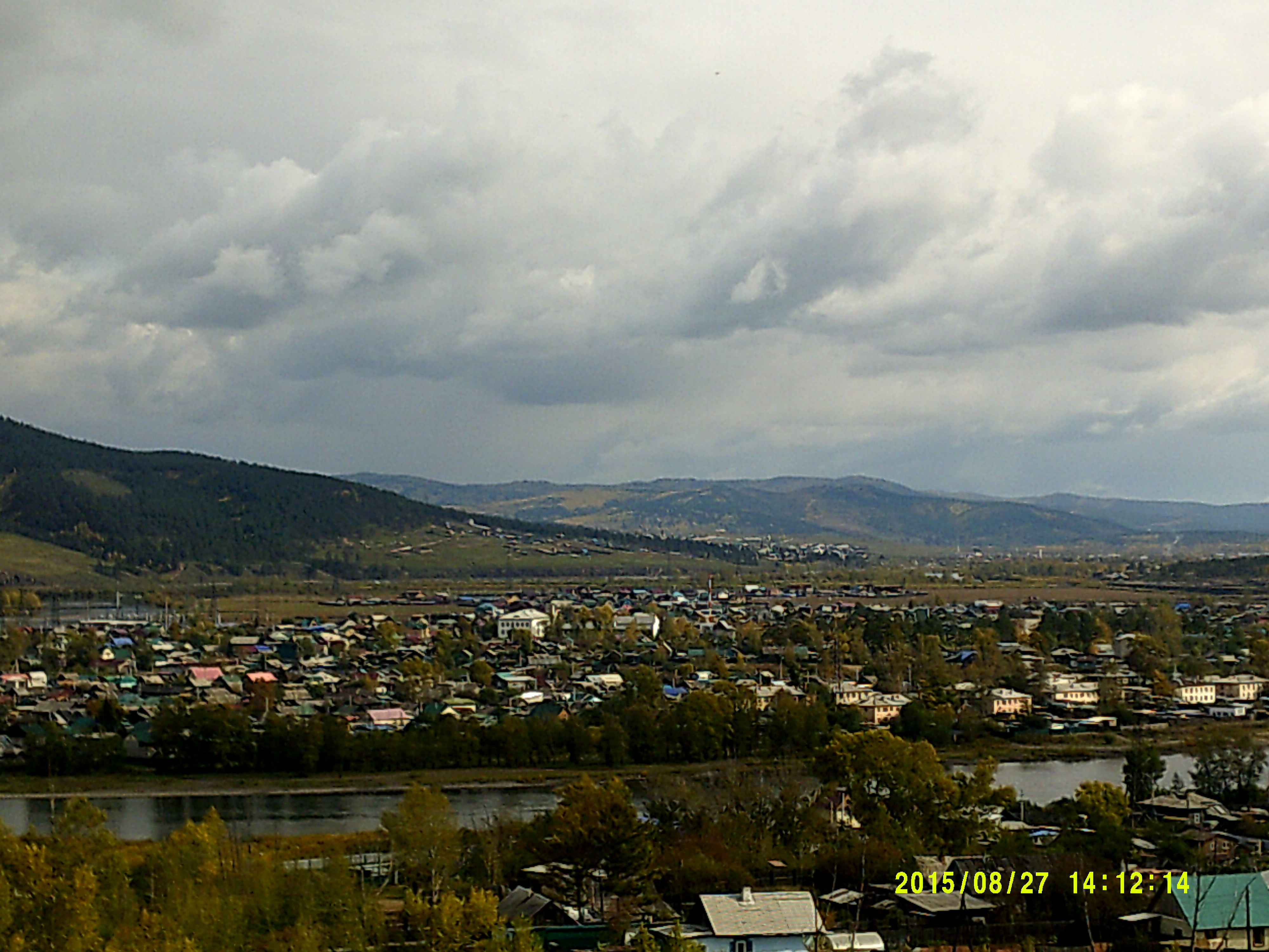 Вид с горы Титовская сопка на осеннюю Читу(район Большой Остров).